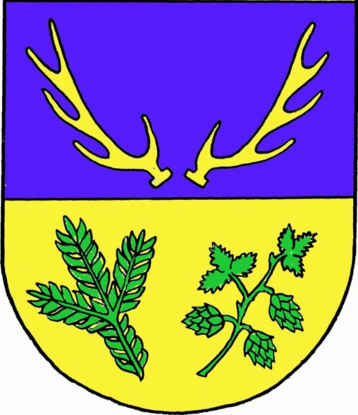 Znak obce Deštnice